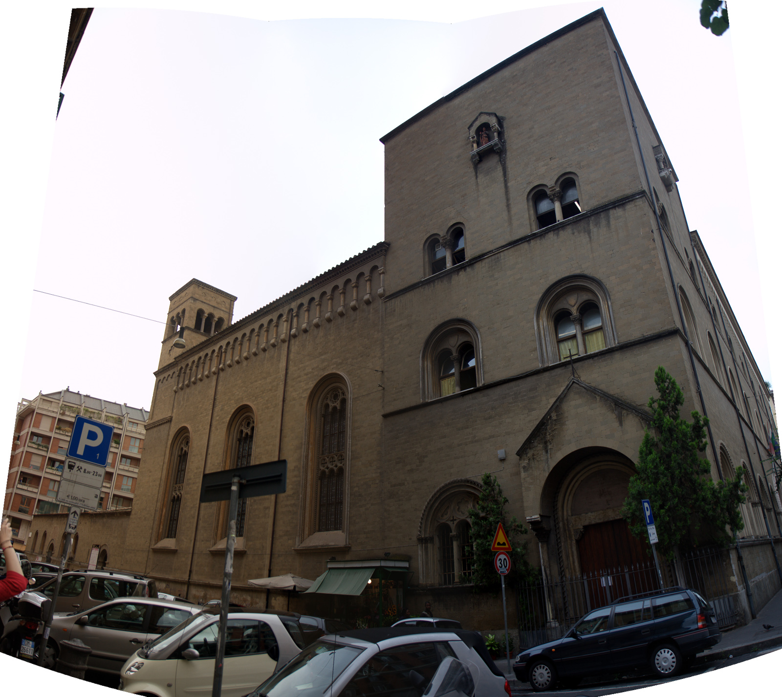 Rione XXII Prati, Roma, Italy